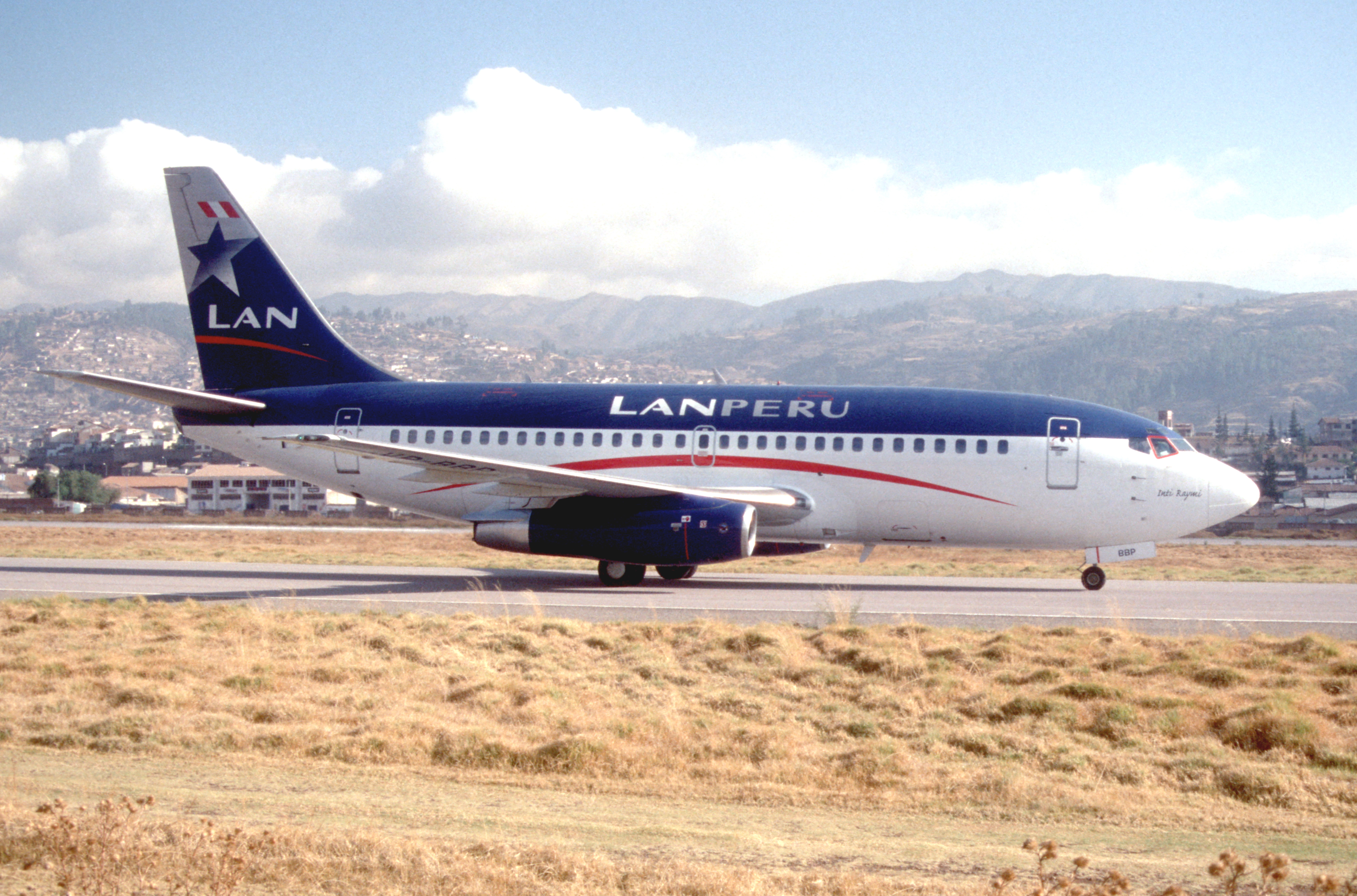 110ai - LAN Peru Boeing 737-2Q3; VP-BBP@CUZ;29.09.2000